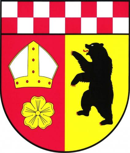 znak, Nedvězí, okres Svitavy